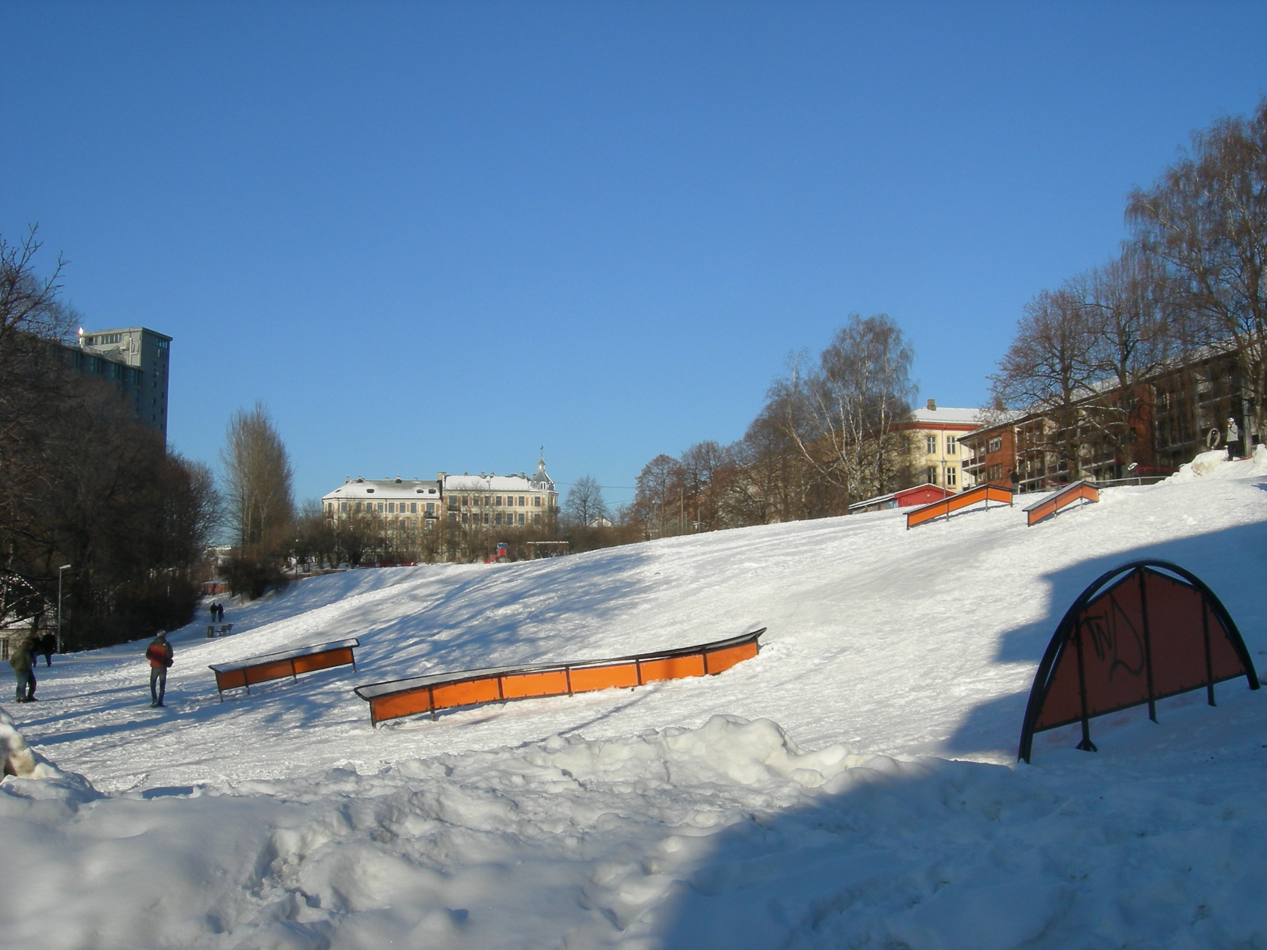 Grünerhagen park, Oslo, Norway